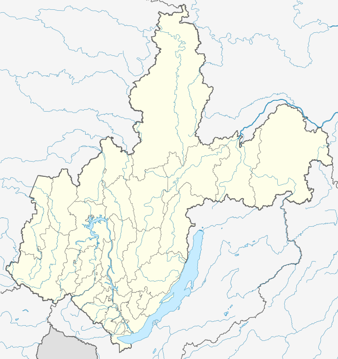 Административная карта Иркутской области, Россия. Проекция: Меркатор Координаты для GMT: -R95.3/119.6/50.9/64.5 Инструменты: GMT, Inkscape This map may be incomplete, and may contain errors. Don't rely solely on it for navigation.